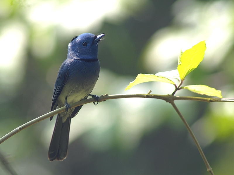 Hypothymis azurea 黑枕藍鶲, Taiwan